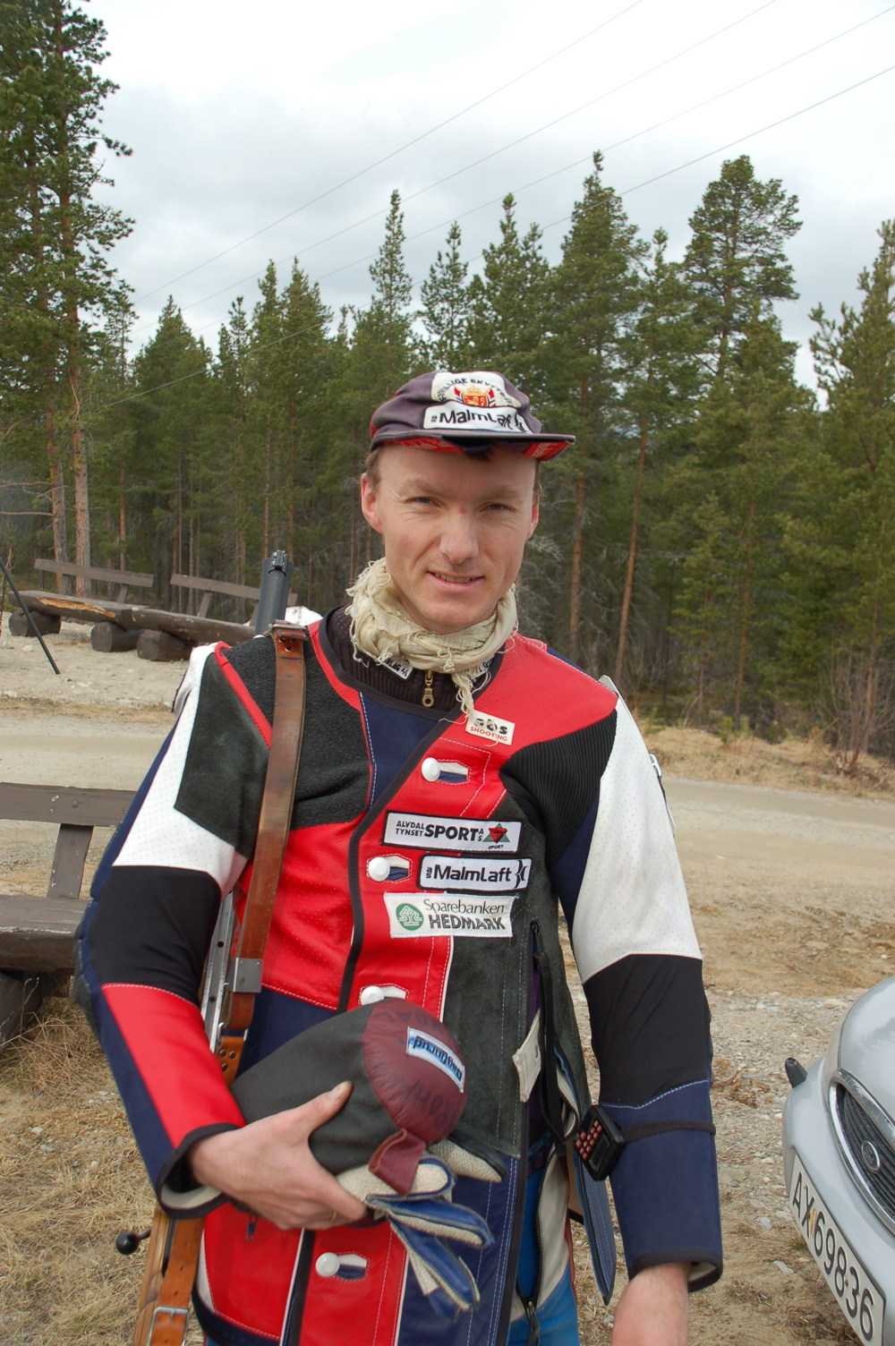 Ingvar Brohaug, Alvdal, skytterkonge 1999